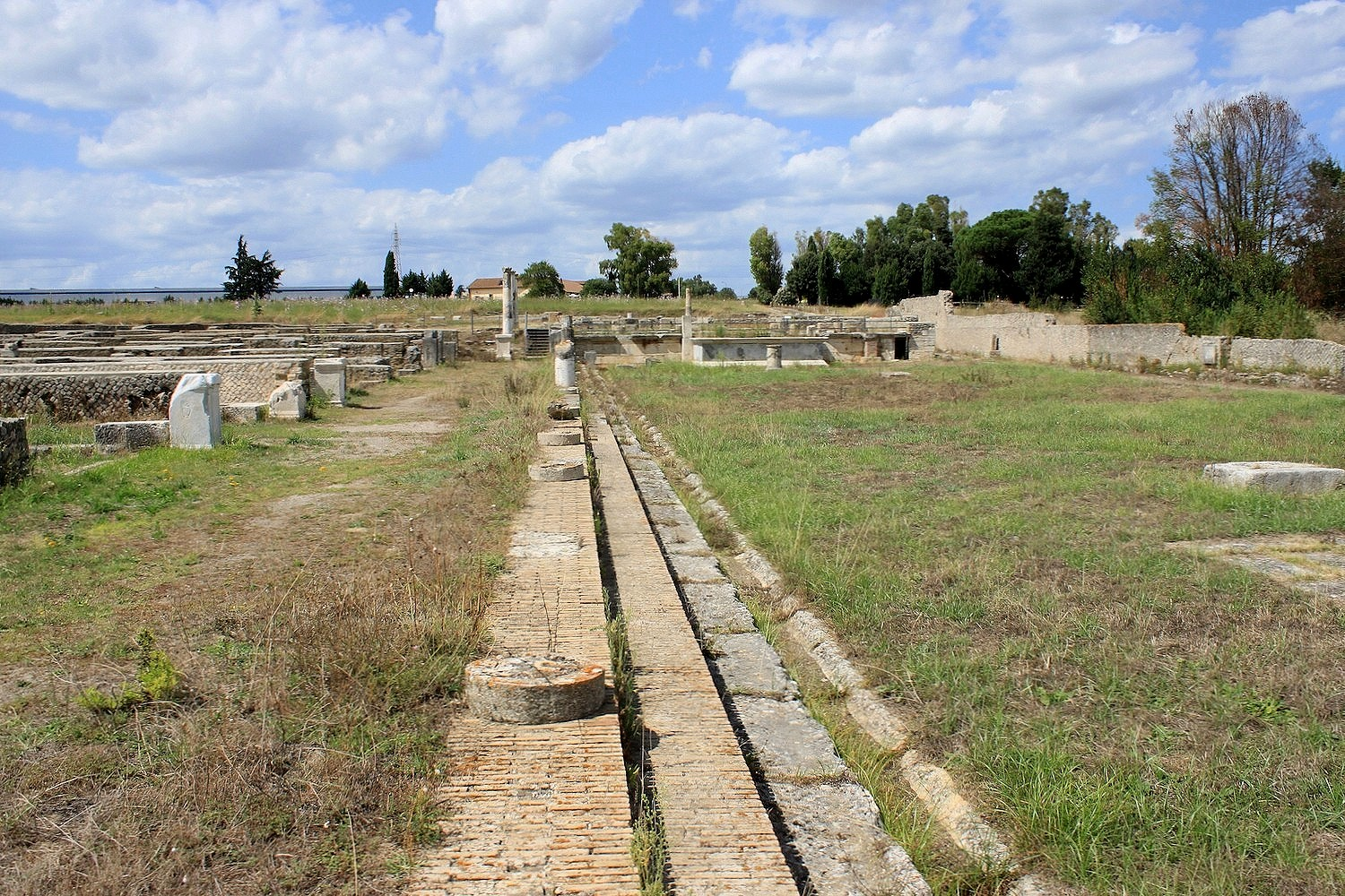 Lucus Feroniae (Italie). Vue du site archéologique, le portique du forum.